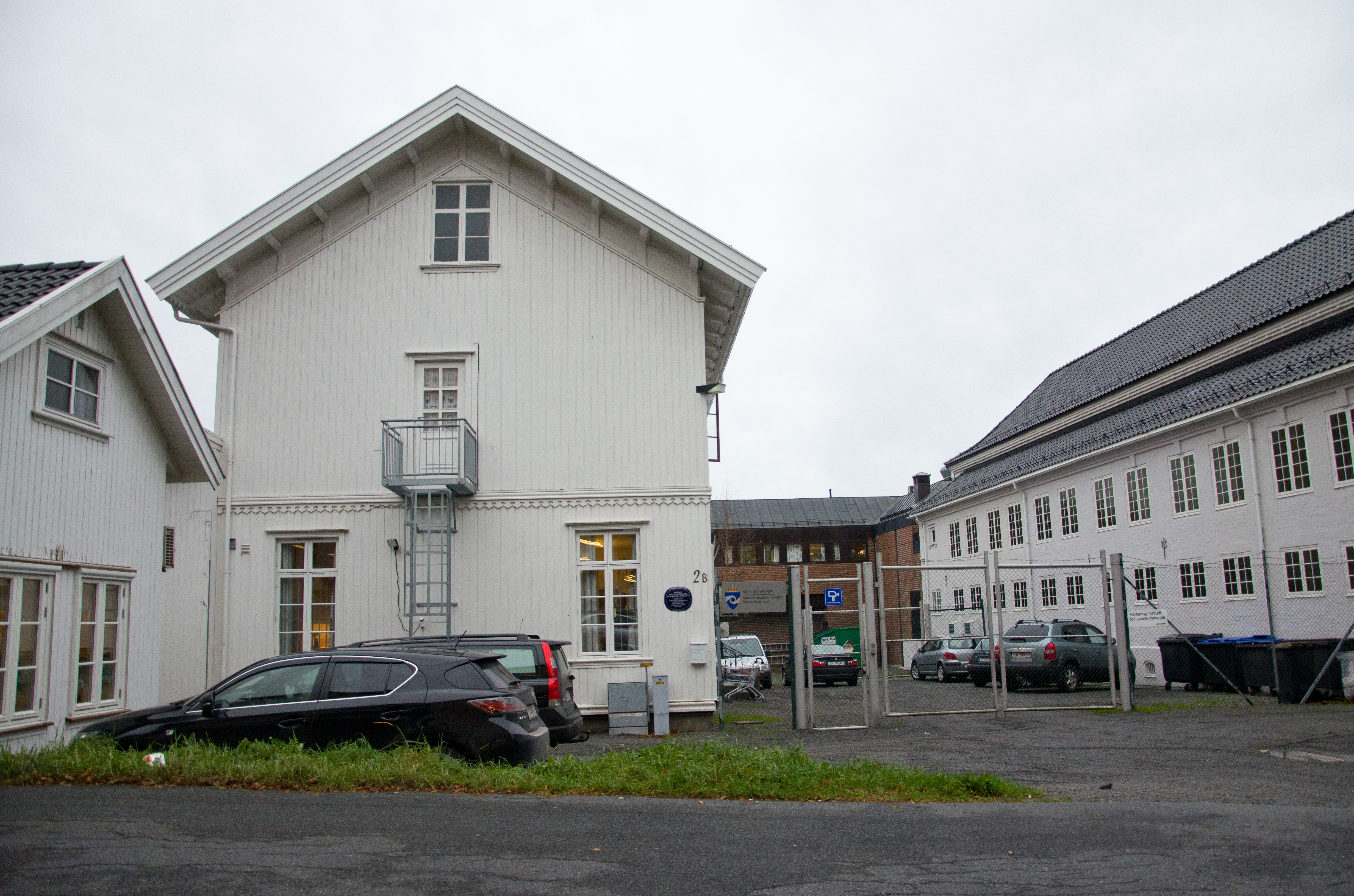 Sandefjord fengsel